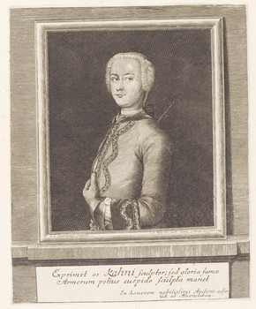 Porträt des Fechtmeisters Anton Friedrich Kahn in Göttingen 1739.